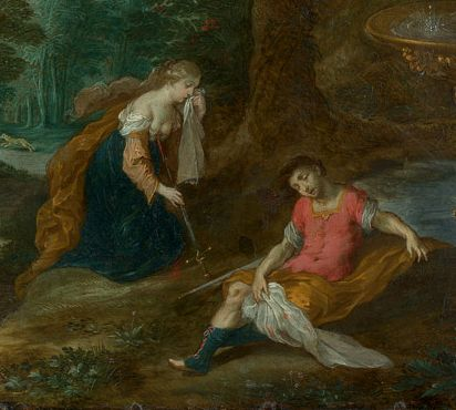 Pyramus und Thisbe. Öl auf Kupfer, 28 x 40 cm.